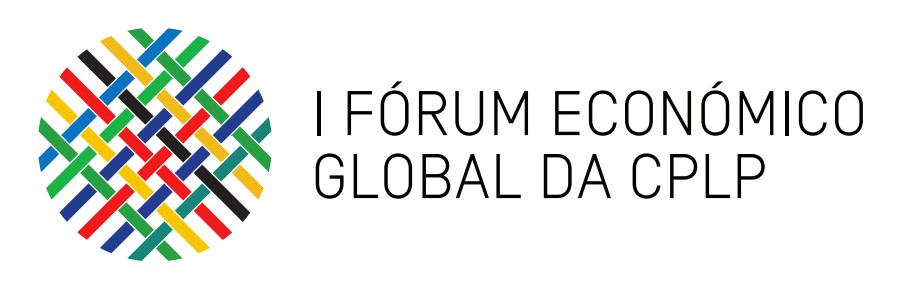 I Forum Economico Global da CPLP